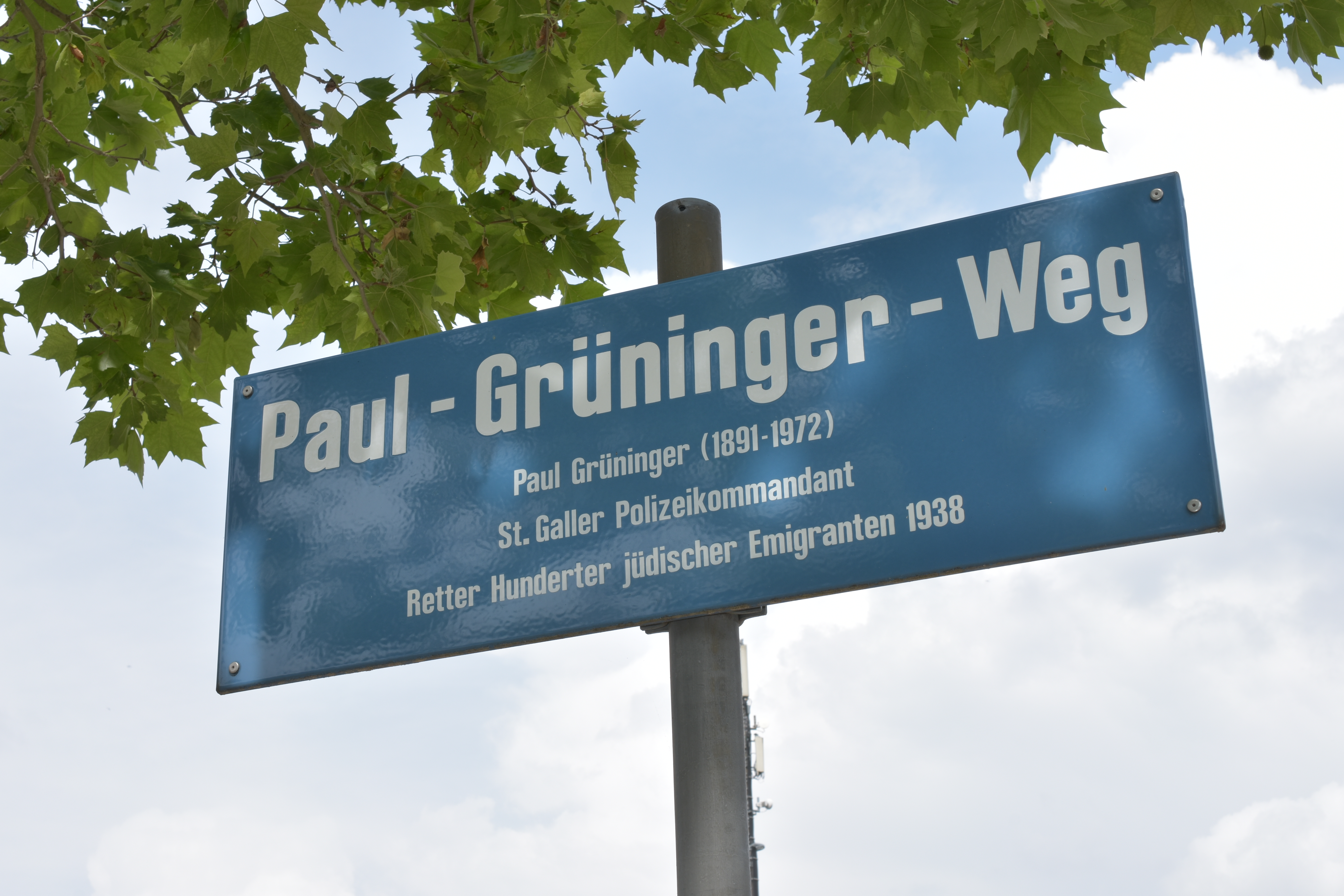 Paul Grüninger-Weg in Zürich-Oerlikon (Switzerland)